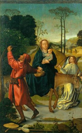 "Fuga para o Egipto", um dos painéis que compõem o "Políptico da Sé de Viseu".